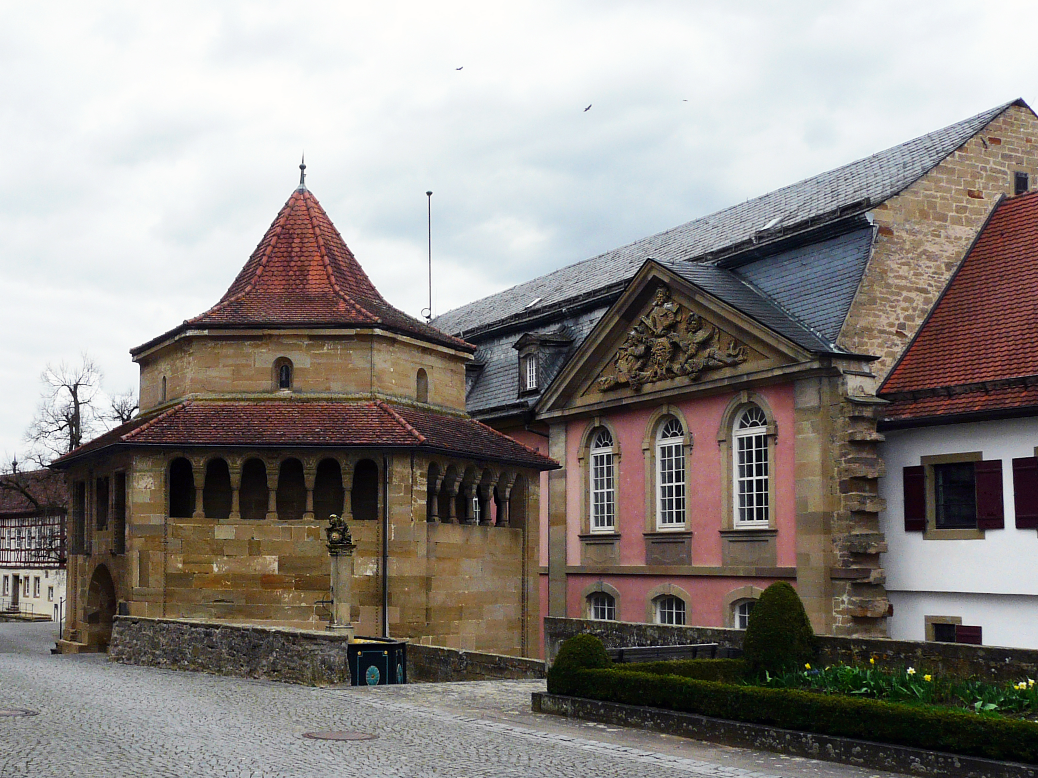 Шестигранная капелла и Новый Деканат